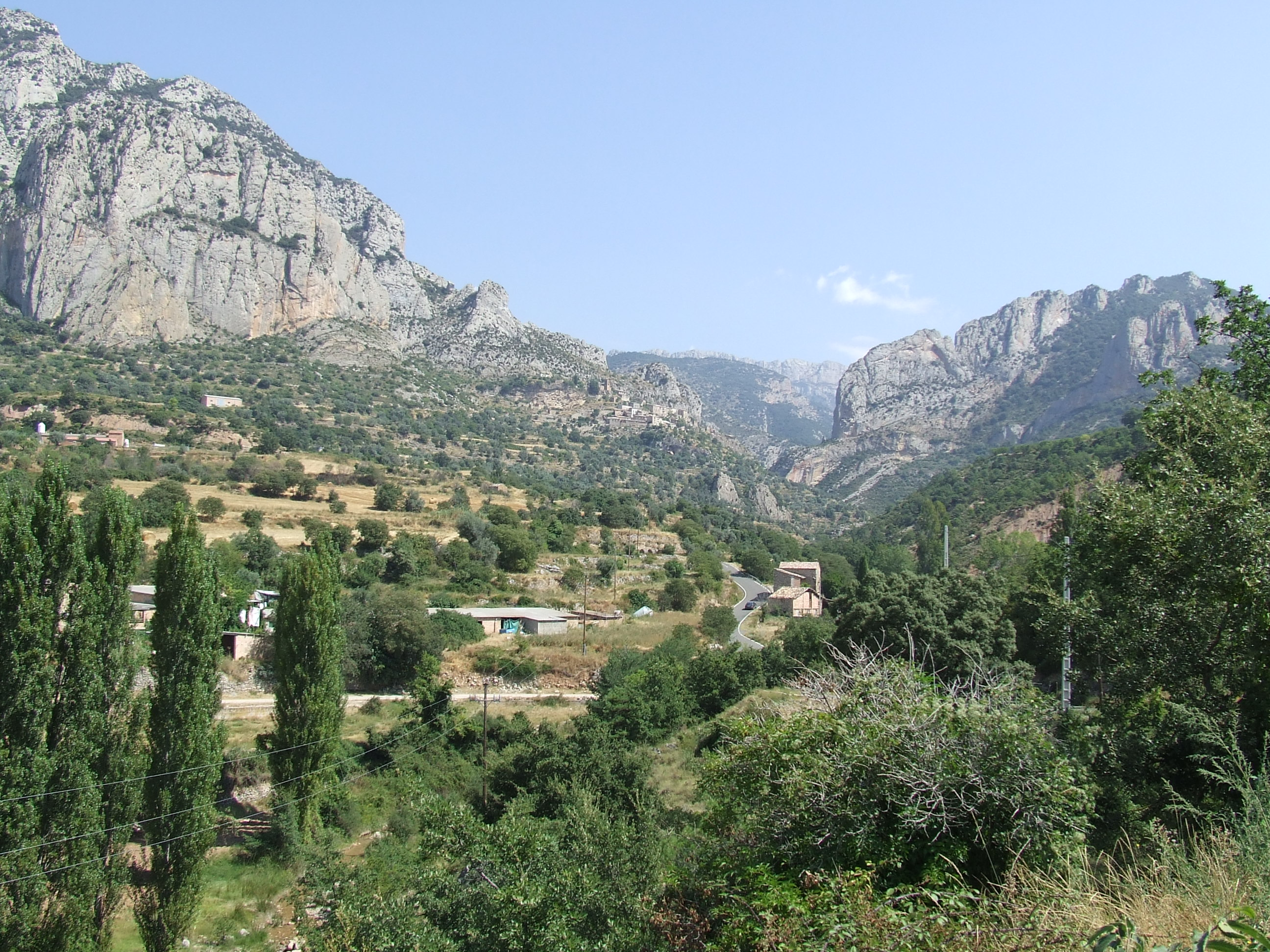 Vista general d'Abella de la Conca i del lloc on es troba.